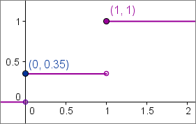 Бернулиев опит - Кумулативна распределба (cdf) за p=0,35